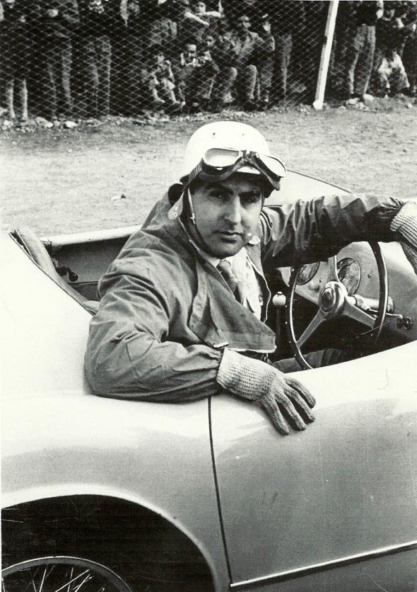 Adolfo “Teddy” Schwelm Cruz sobre un Ferrari 225S, en Mendoza, Argentina, 1952.